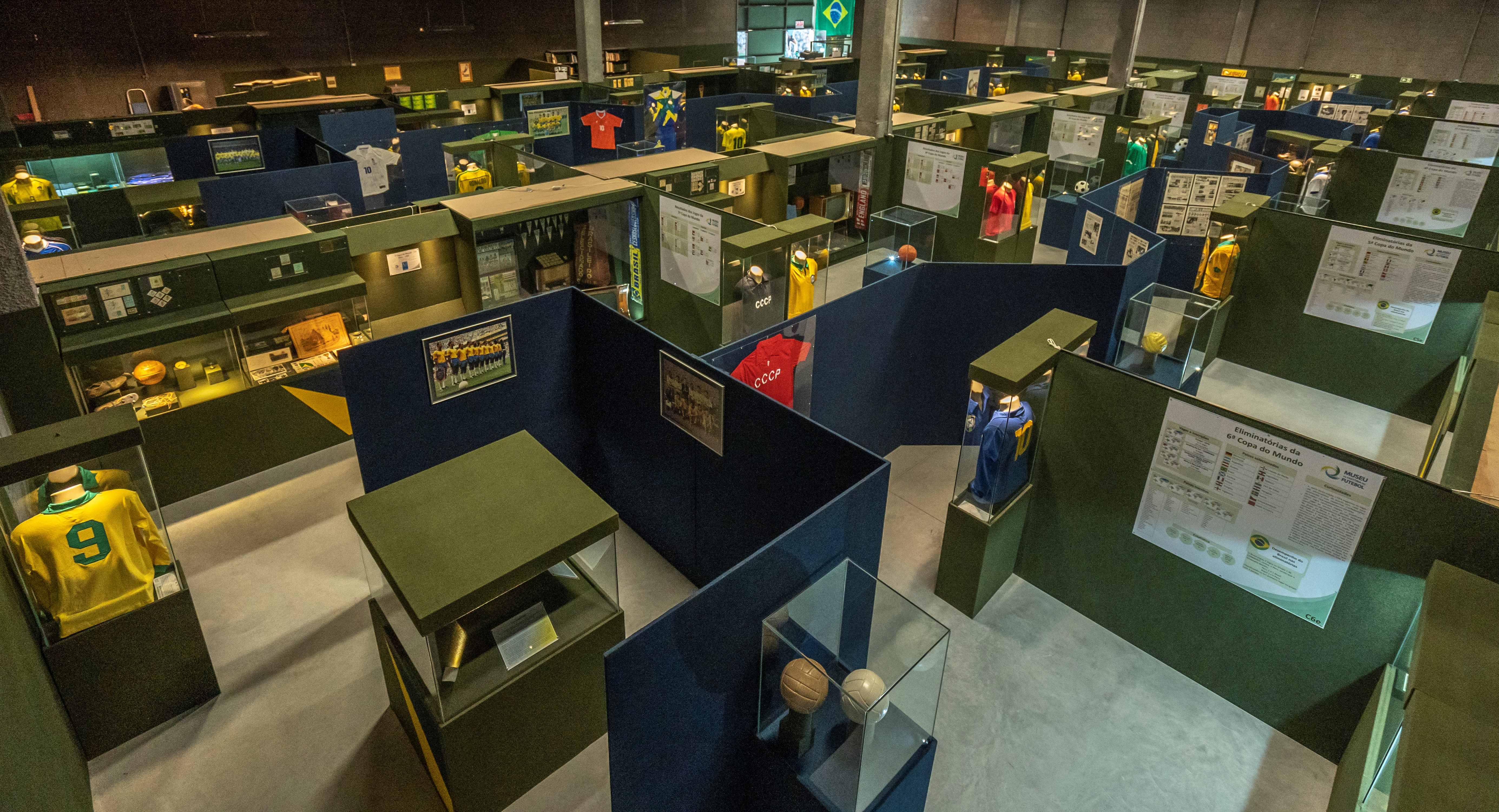 Vista panorâmica da exposição de longa duração do Museu da História do Futebol, em Porto Belo-SC.